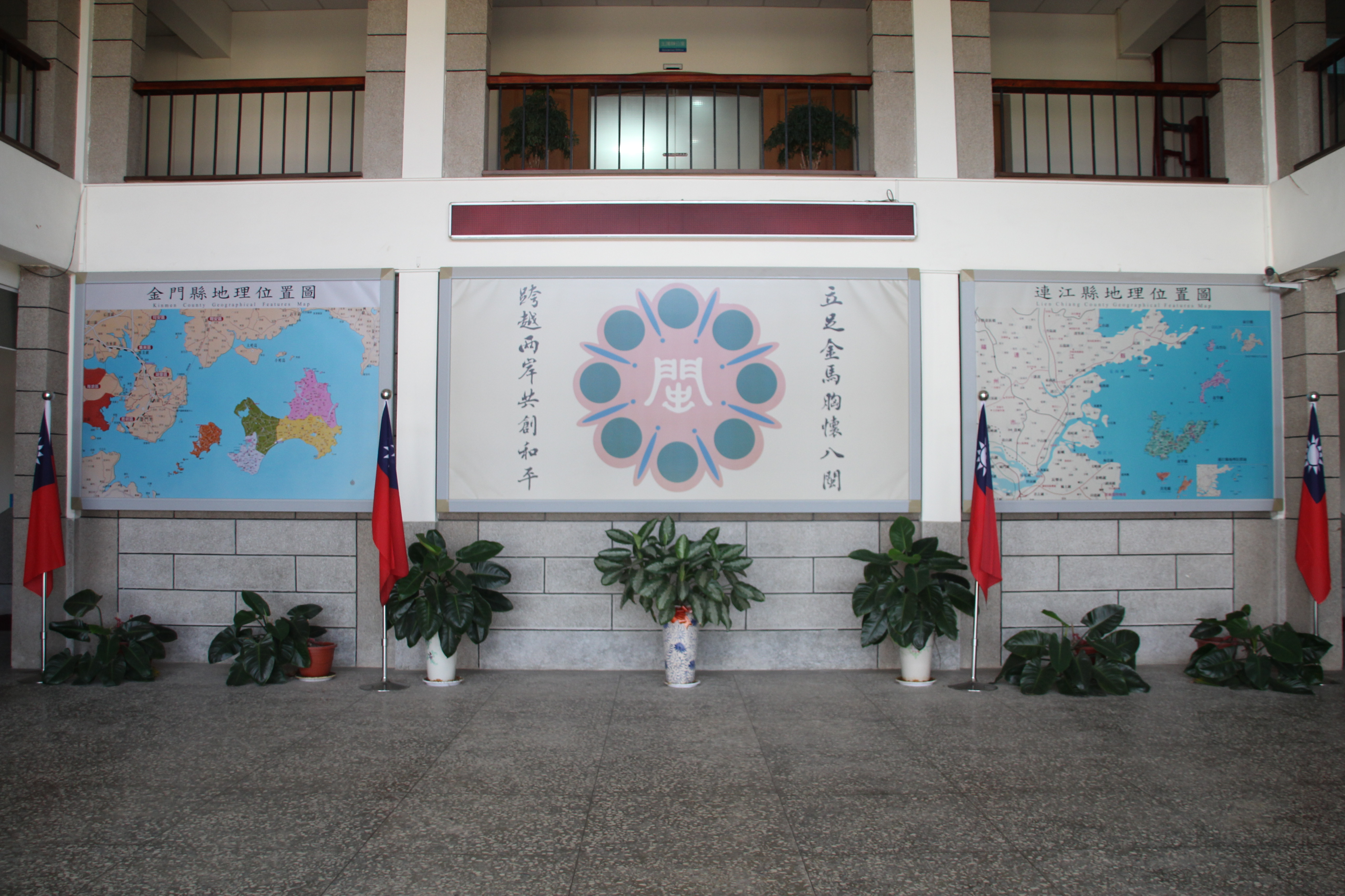 中文（台灣）: 中華民國福建省政府大廳。